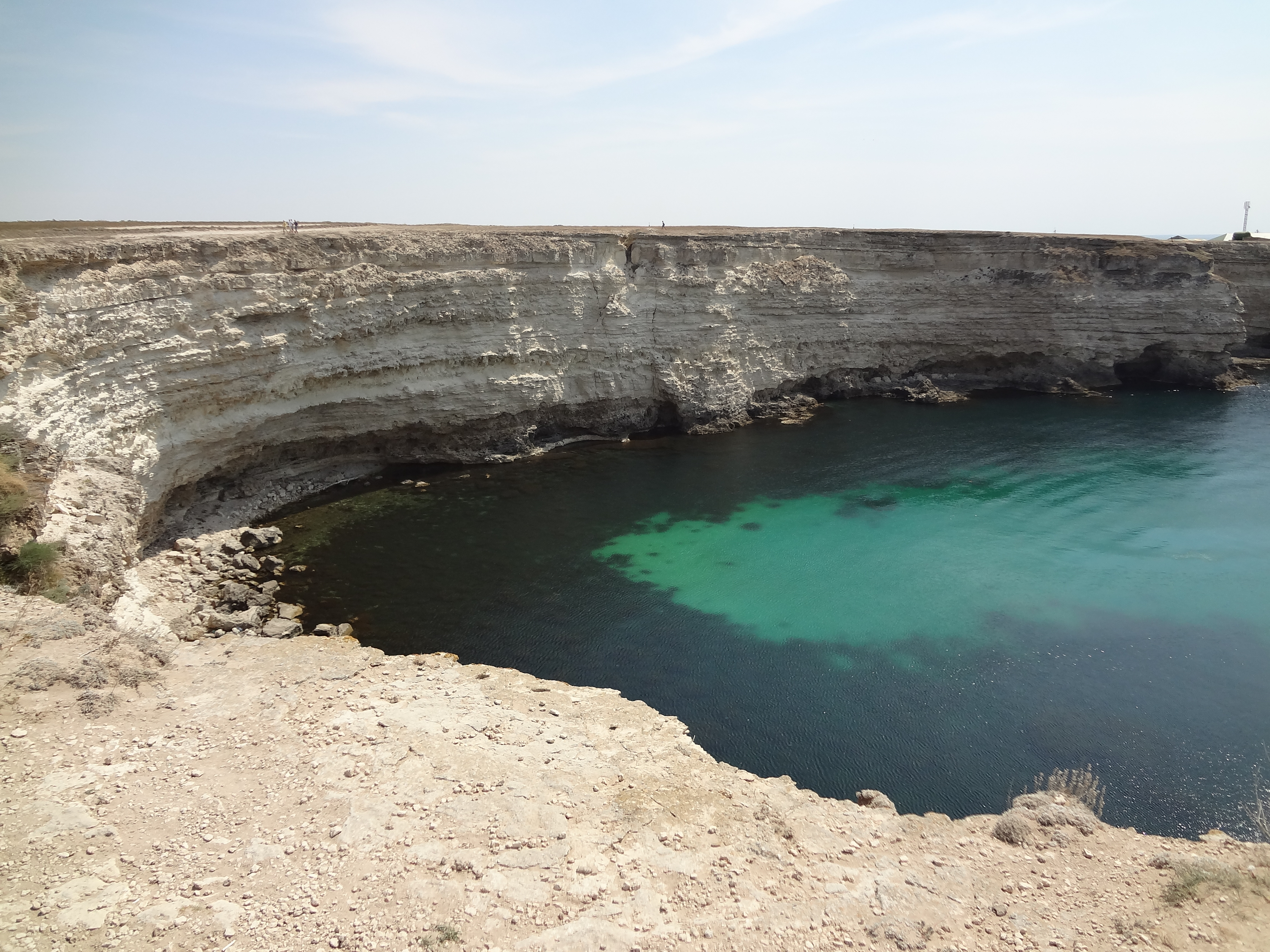 Тарханкут мыс